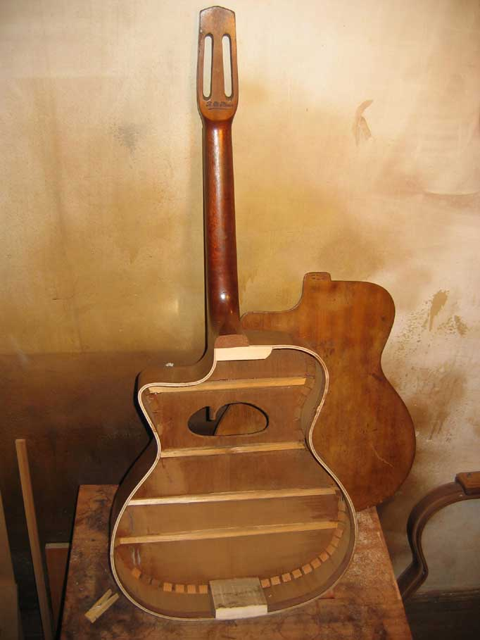 Di Mauro cigánygitár felnyitva egy bolhapiacon